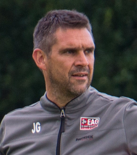 Jocelyn Gourvennec en 2014